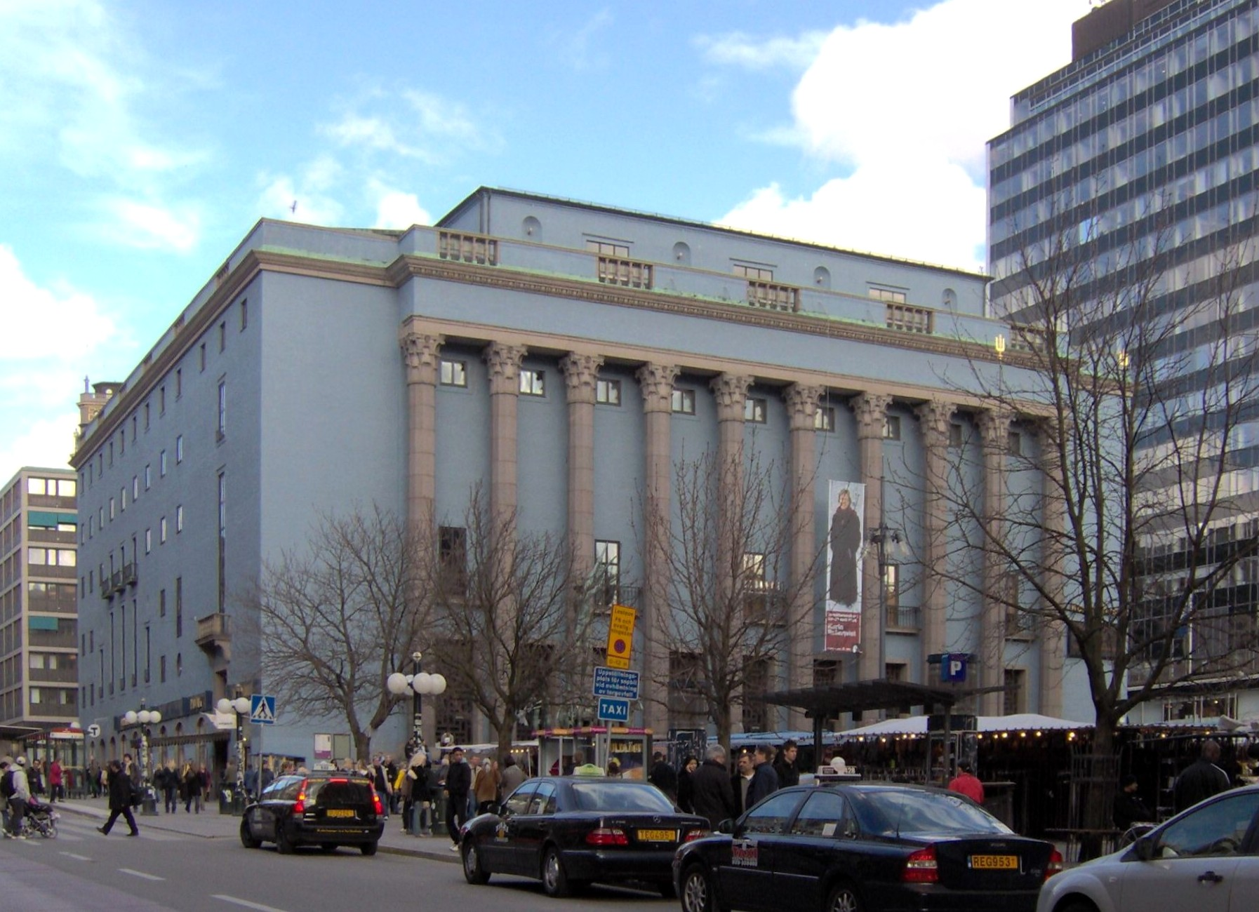 Konserthuset i Stockholm med Hötorget och en Hötorgskrapa.